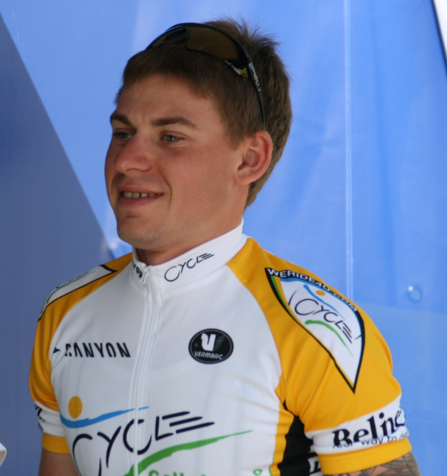 Sergey Kolesnikov aux Quatre jours de Dunkerque 2008